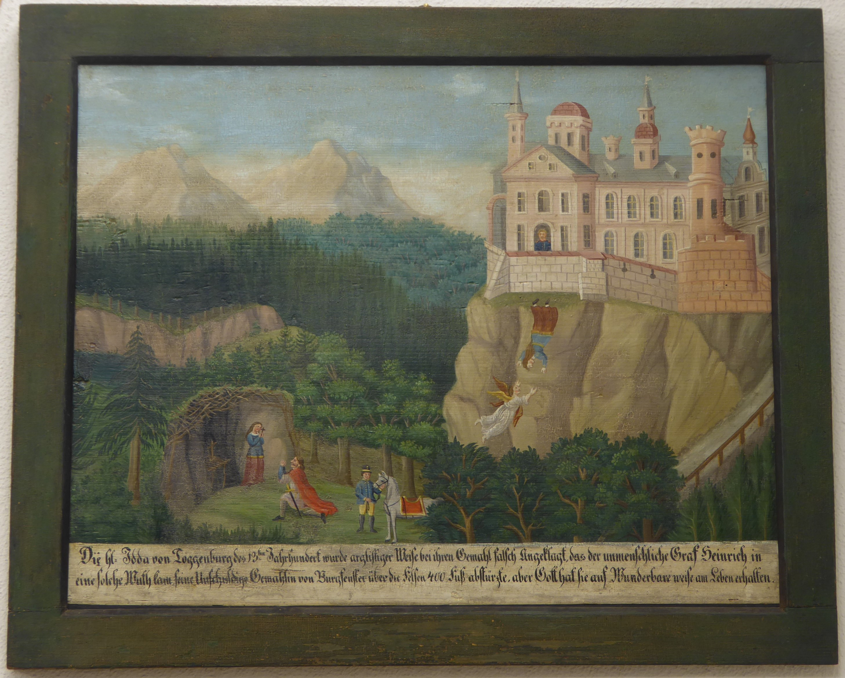 Ida von Toggenburg – Gemälde im Toggenburger Museum Lichtensteig